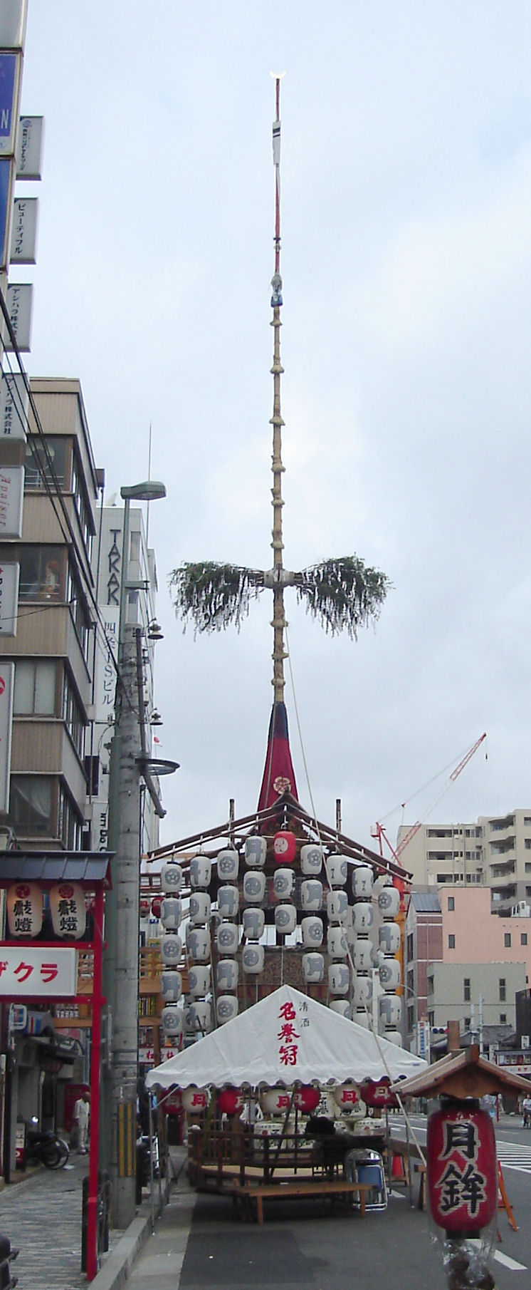 Tsuki Boko(月鉾), Kyoto,Japan